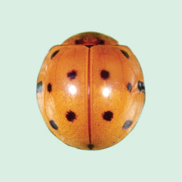 Figure 9; Harmonia dimidiata (Fabricius).